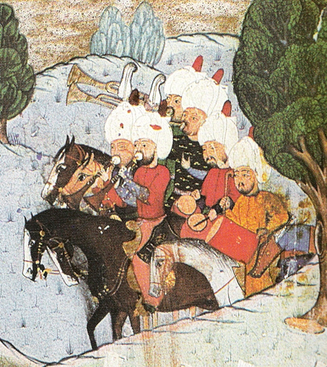 Detail einer Illustration zu Nüshet el-esra el-ahbar der seref-i Szigetvár, Chronik von Ahmed Feridun. Der Ausschnitt zeigt die mehterhâne, die den Rückzug aus der Schlacht um Szegetvár begleiten. Sultan Süleymans I. Tod wird verheimlicht und die Rückreise der Leiche wird als Triumphzug des lebenden Sultans ausgegeben. Entsprechend spielt die mehterhâne triumphale Märsche.